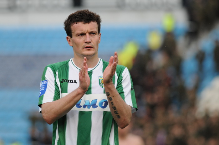 Artem Fedetskyi in 2012